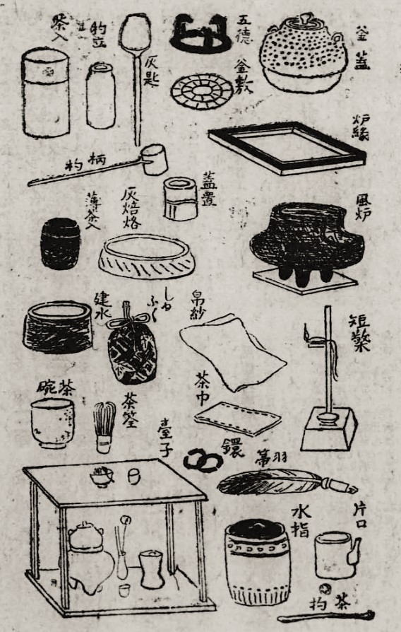 茶道具 国民の顧問 第３巻